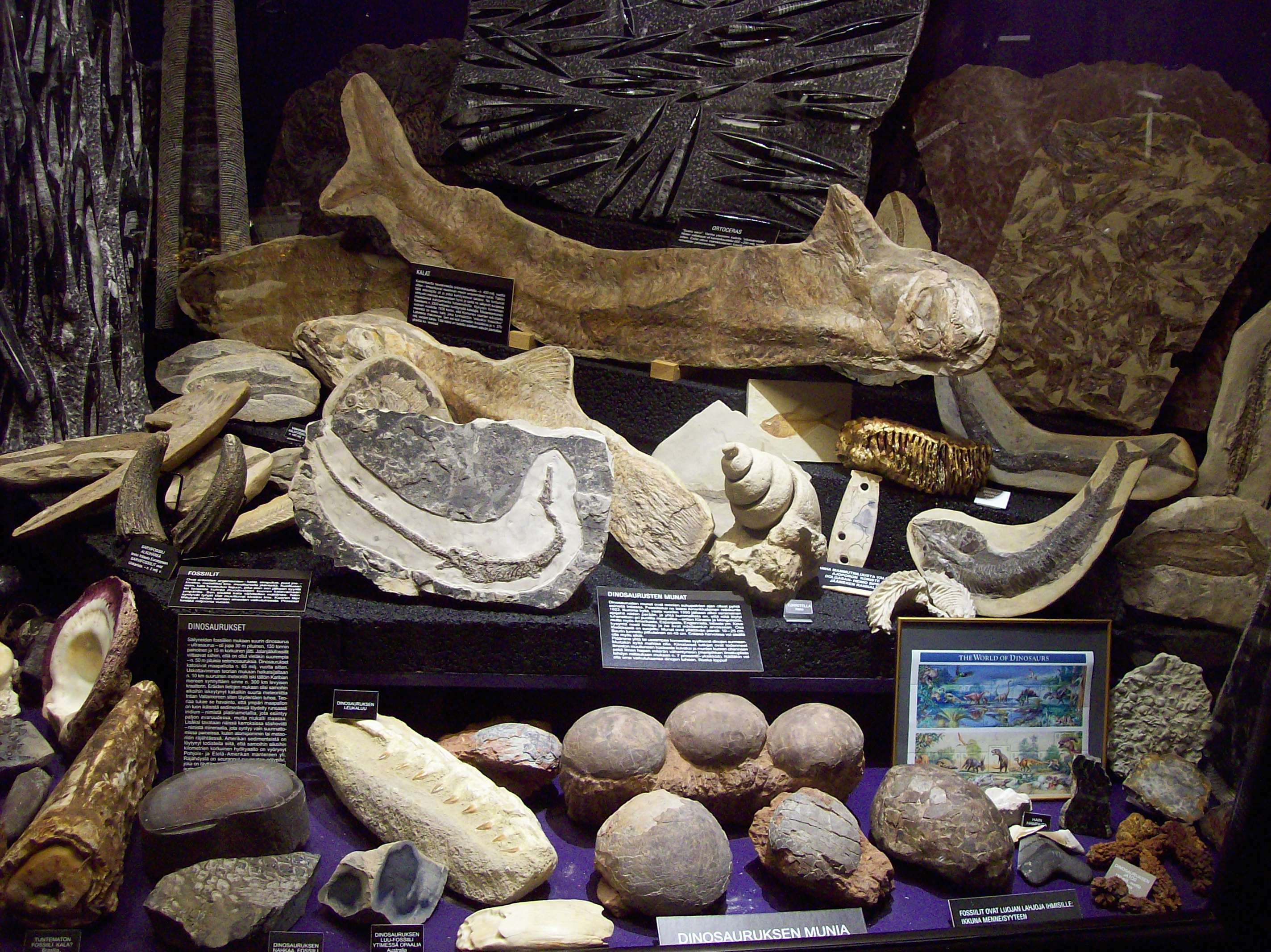 Tampere Mineral museum